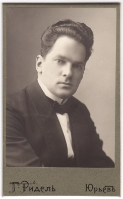 Nikolai Popov